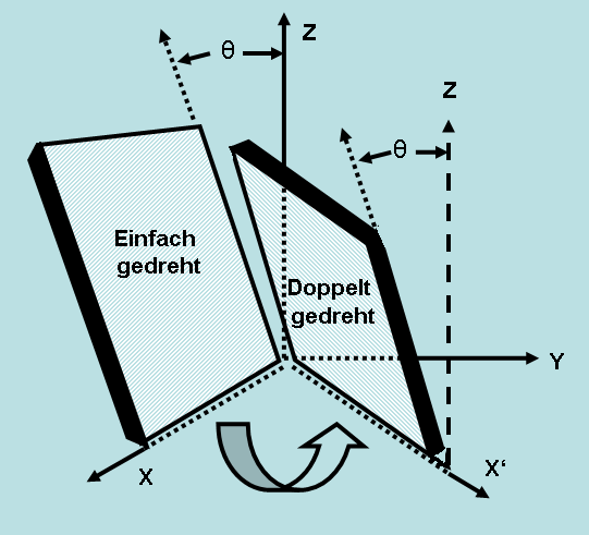 doppelt gedrehter Schwingquarzschnitt